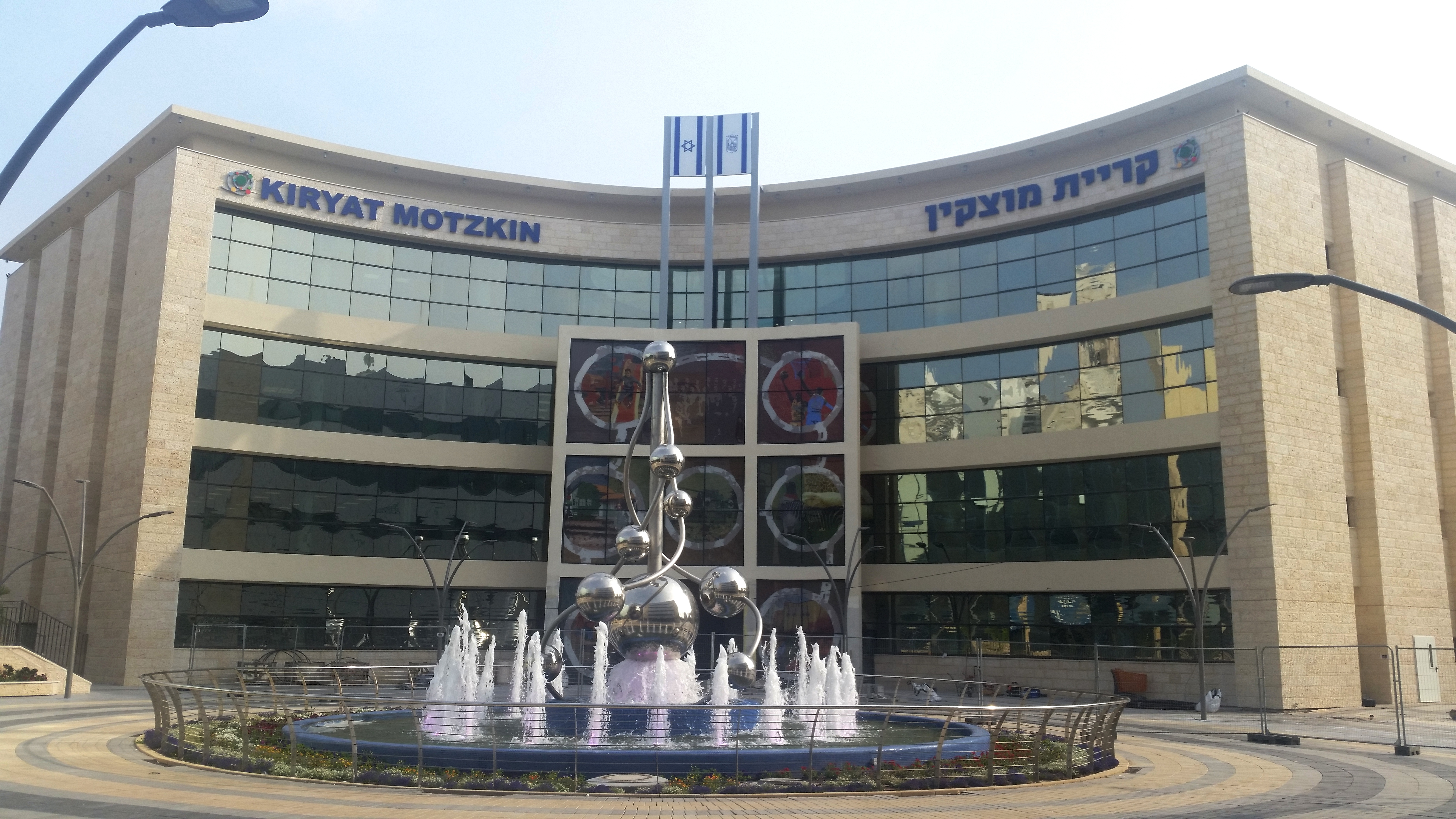 חזית מבנה עיריית קריית מוצקין טרם איכלוסו